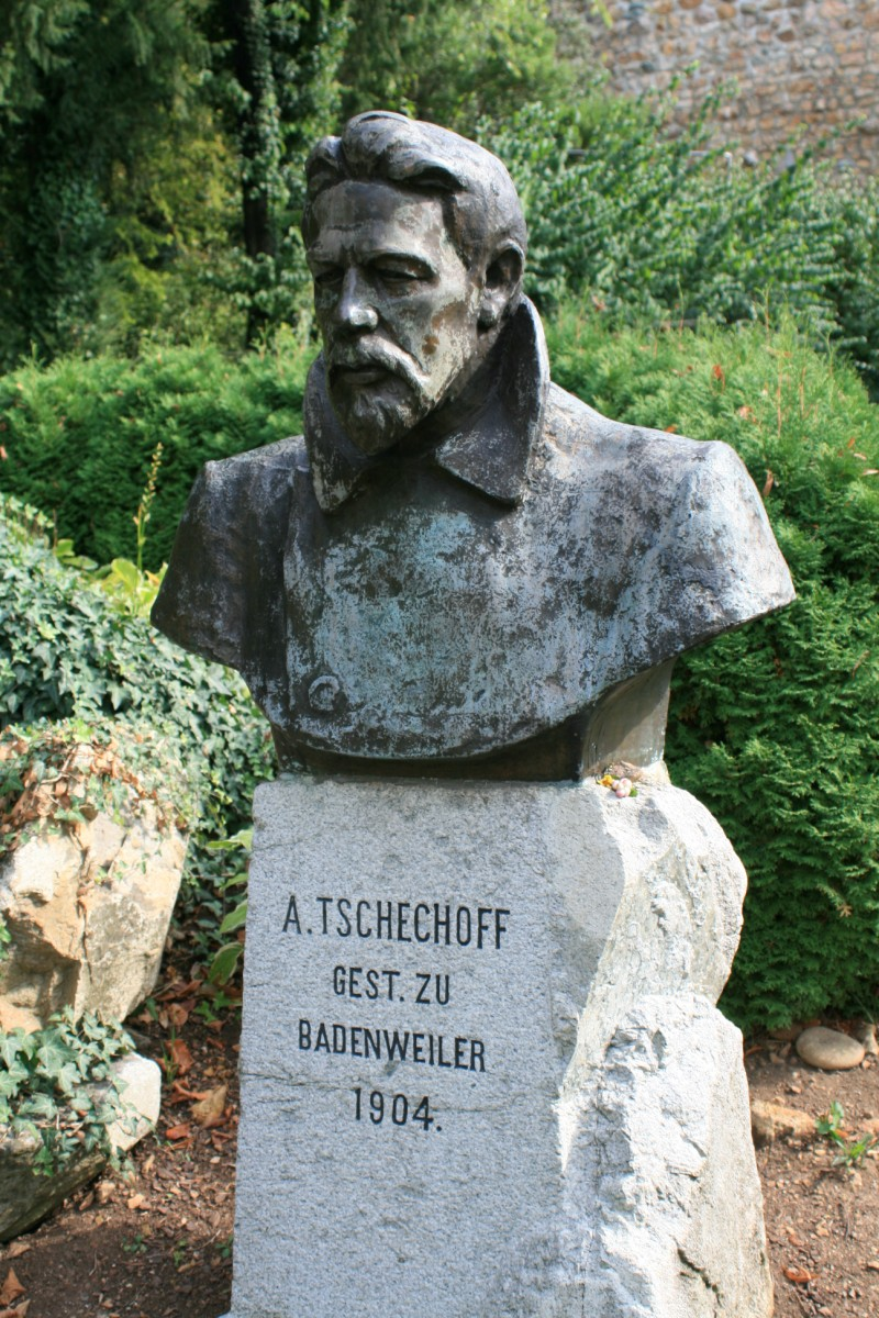 Buste de Tchekhov à Badenweiler